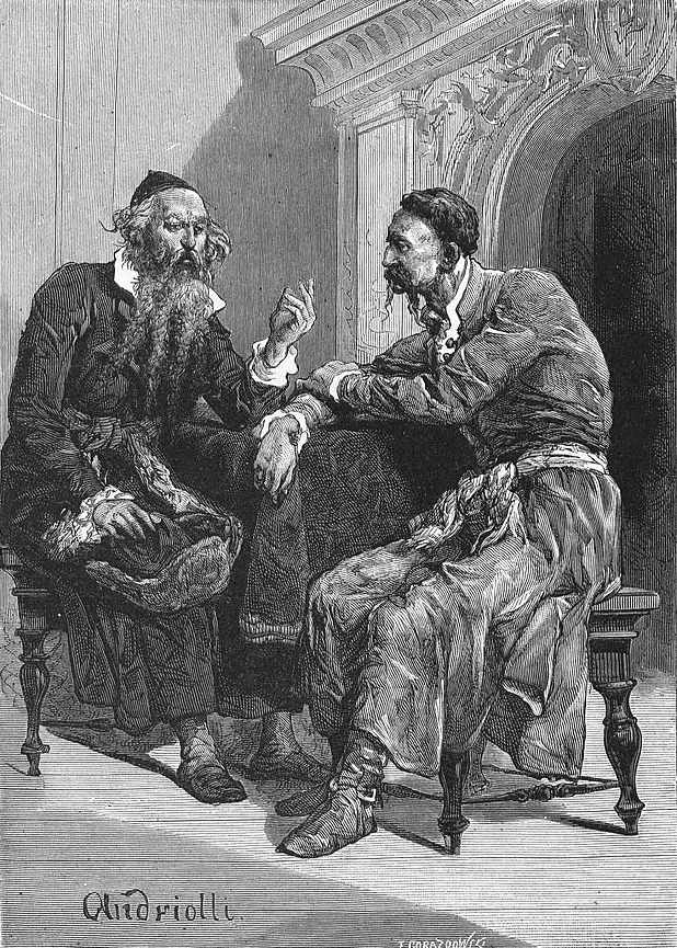 Ilustracje do książki Elizy Orzeszkowej "Meir Ezofowicz"